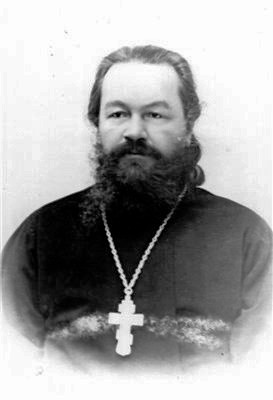 Отец Дмитрий Яковлевич Попов (псевдонимы Д. Пунимов и Д. Я. Подов; 3 мая 1863, Вологодская губерния — 9 октября 1921, Автономная область Коми) — священник, депутат IV Государственной думы от Вологодской губернии (1912—1917).